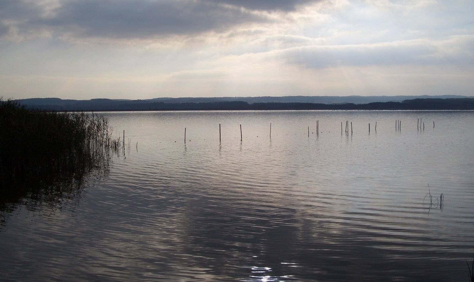 Blick auf den Galenbecker See. Abfluss in Richtung Weißer Graben.